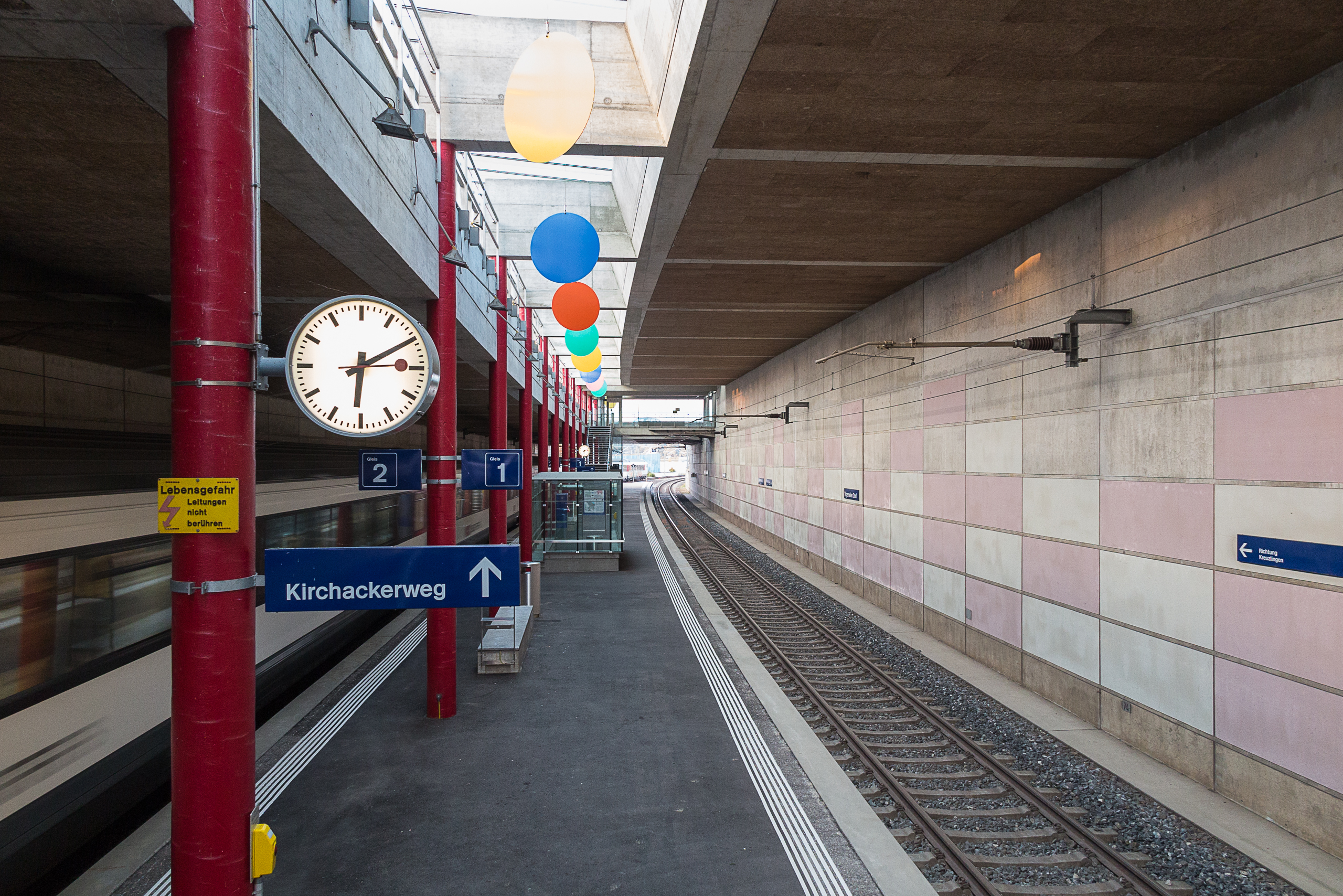 Gleisanlage des Bahnhofs Tägerwilen-Dorf